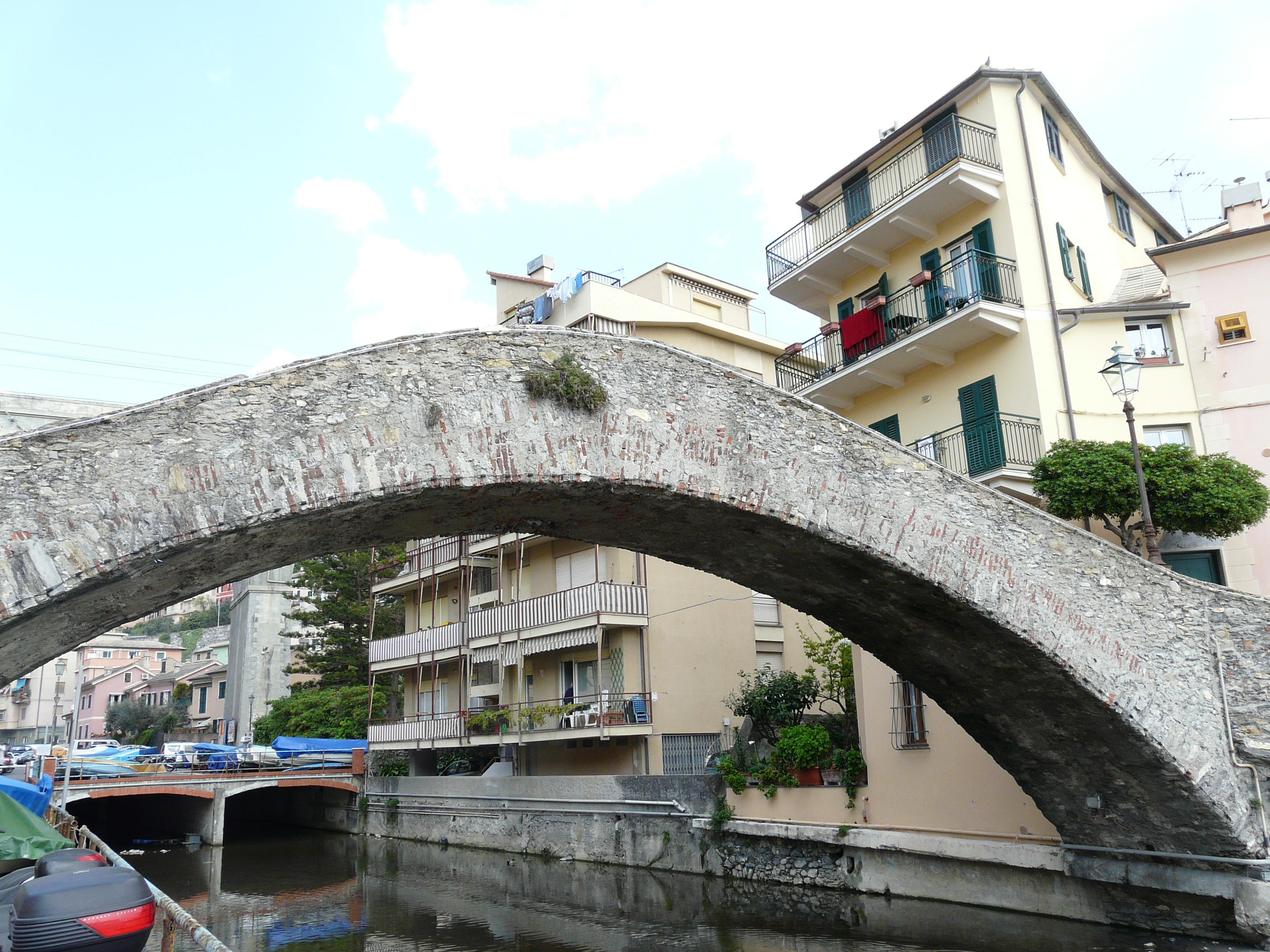 Ponte romano, Bogliasco, Liguria, Italia